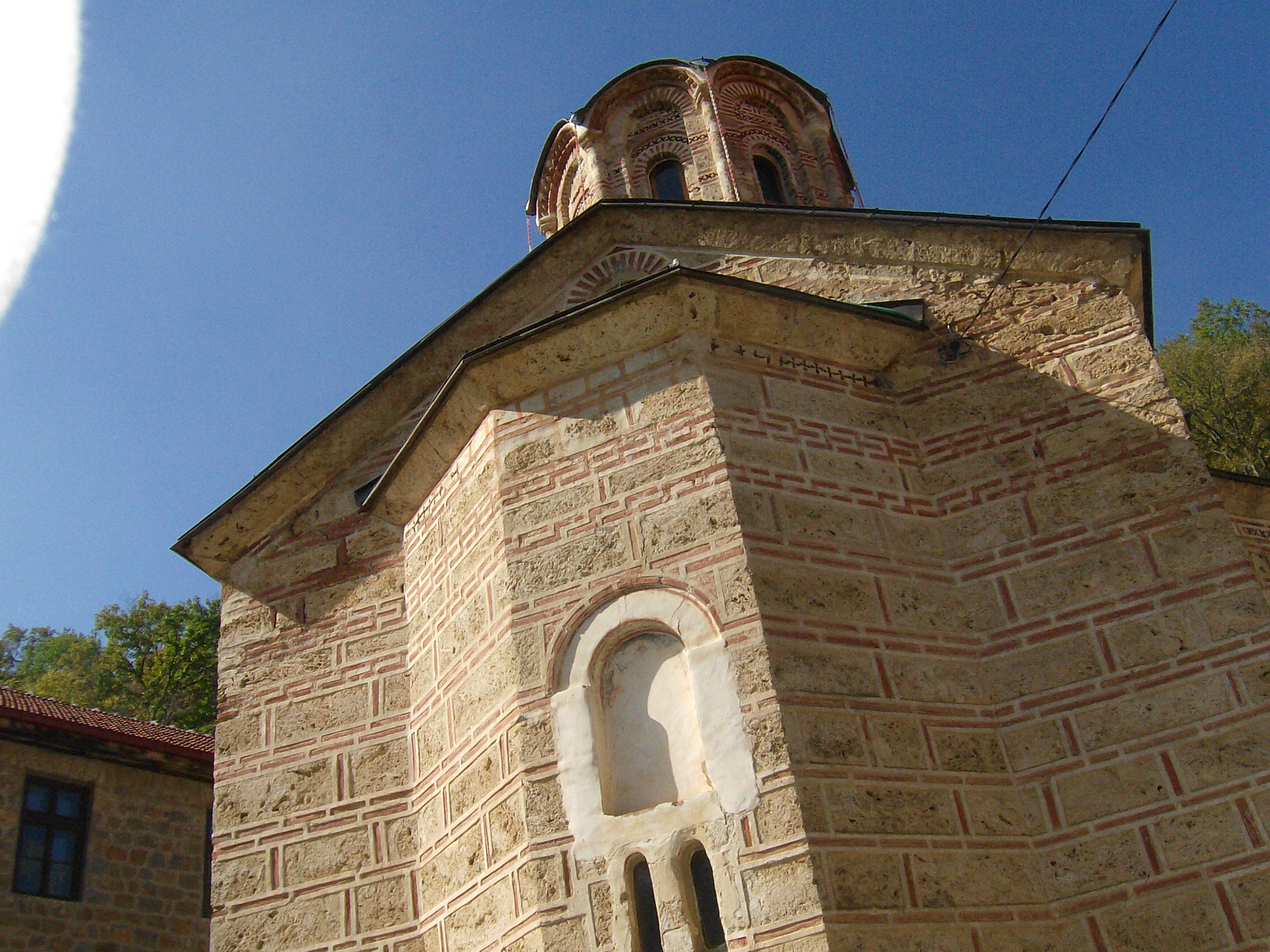 Manastir Sv.Arhangeli (Mihail i Gavril)- Kuceviste